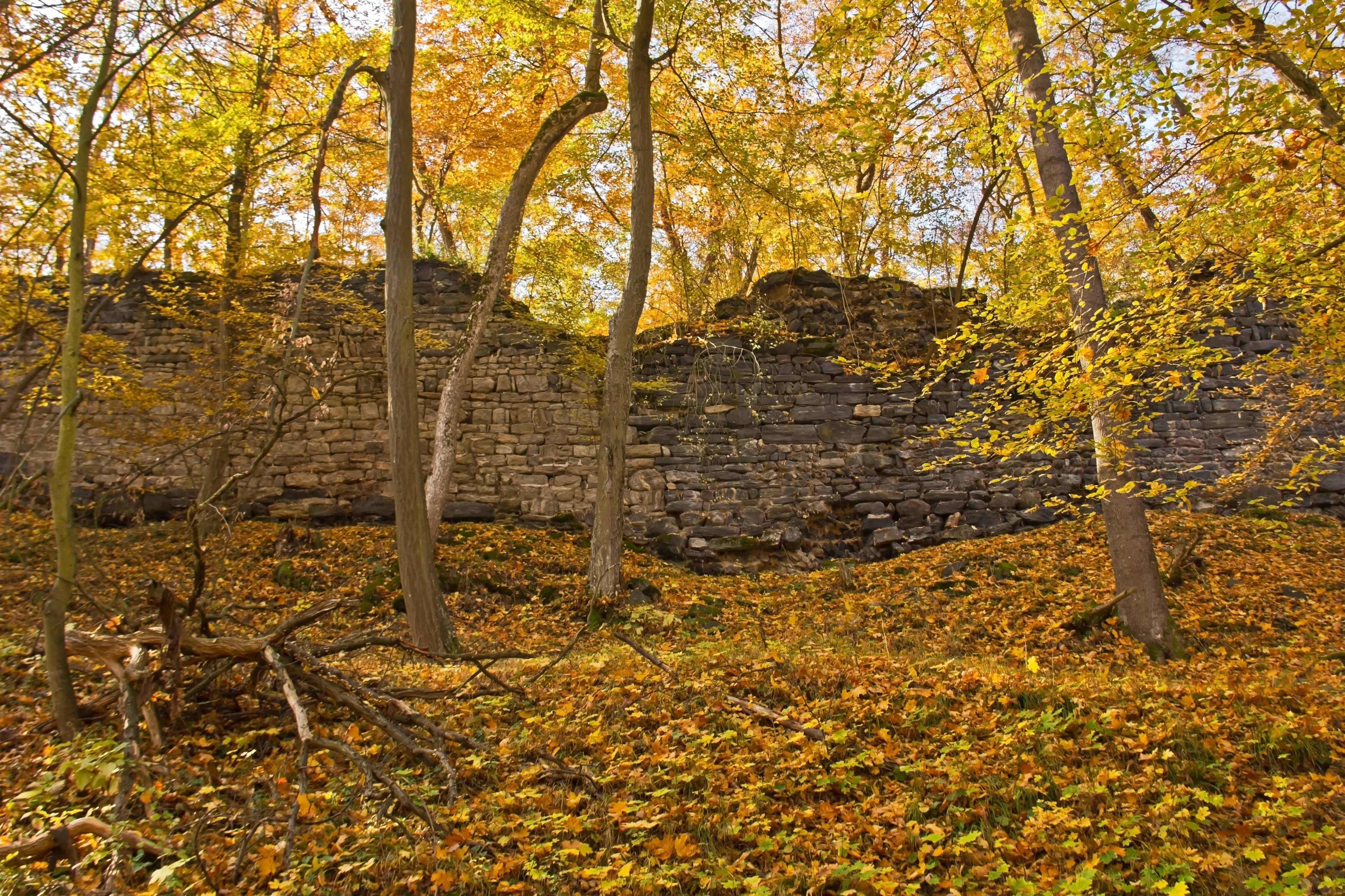 Die Burgruine Ödes Schloss auf dem kleinen Umlaufberg südöstlich des Stiftes wurde früher auch Stein am Kamp oder, nach dem ehemaligen Besitzer Reinprecht Turs von Lichtenfels, Tursenstein genannt.